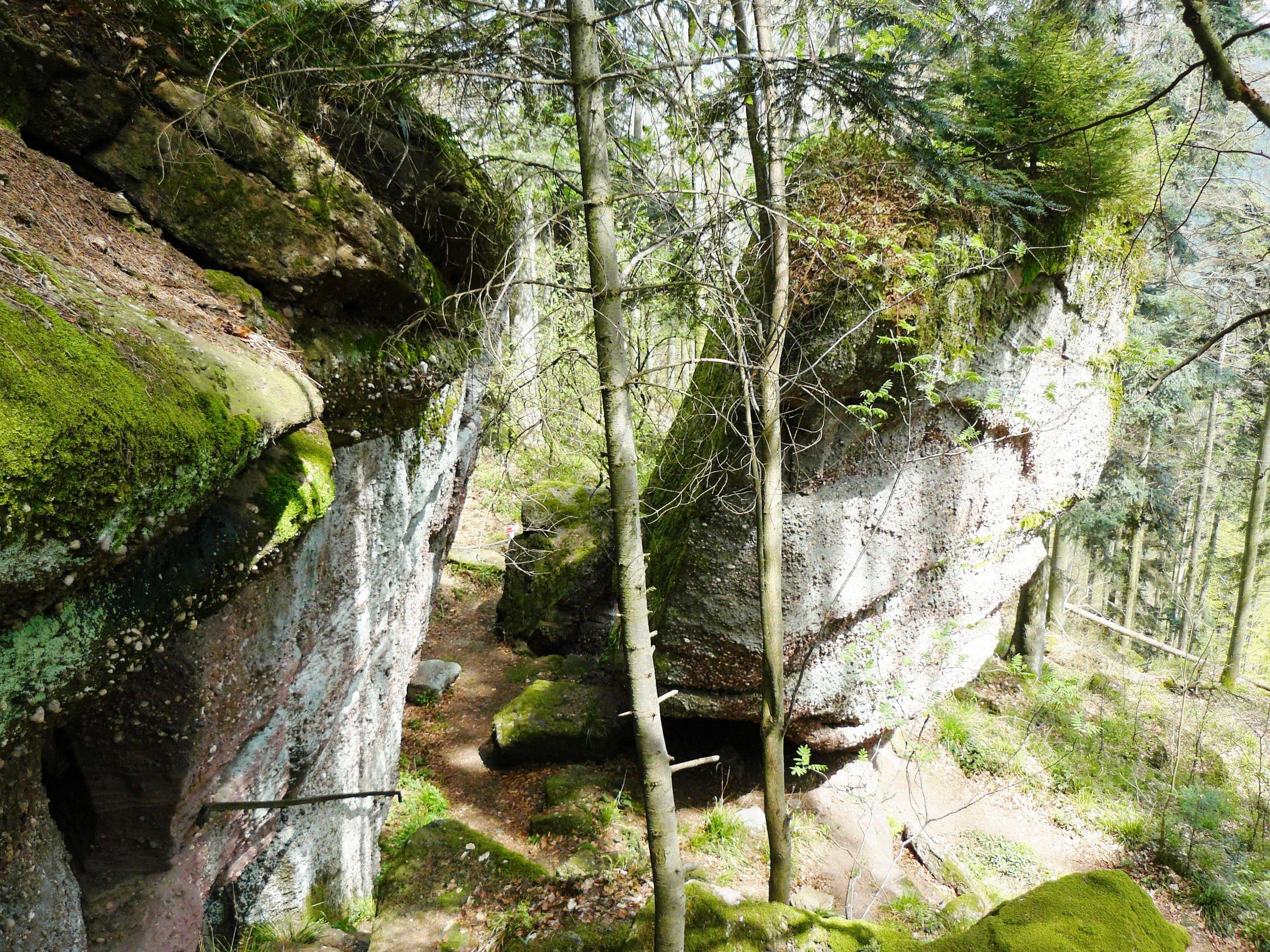 Breitenau, Bas-Rhin, Fr., Rocher de la Salière vu depuis sa base